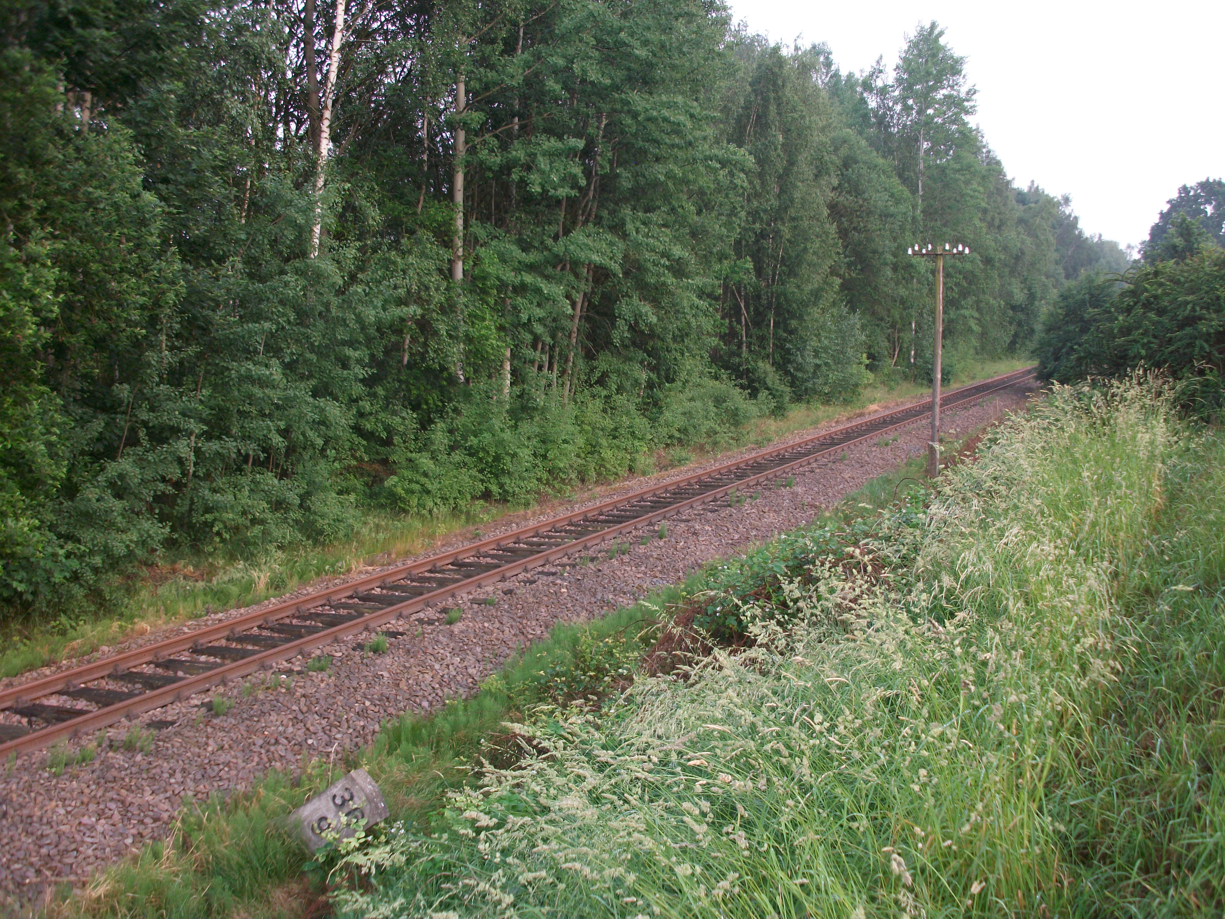 Standort Biesern Ladestelle